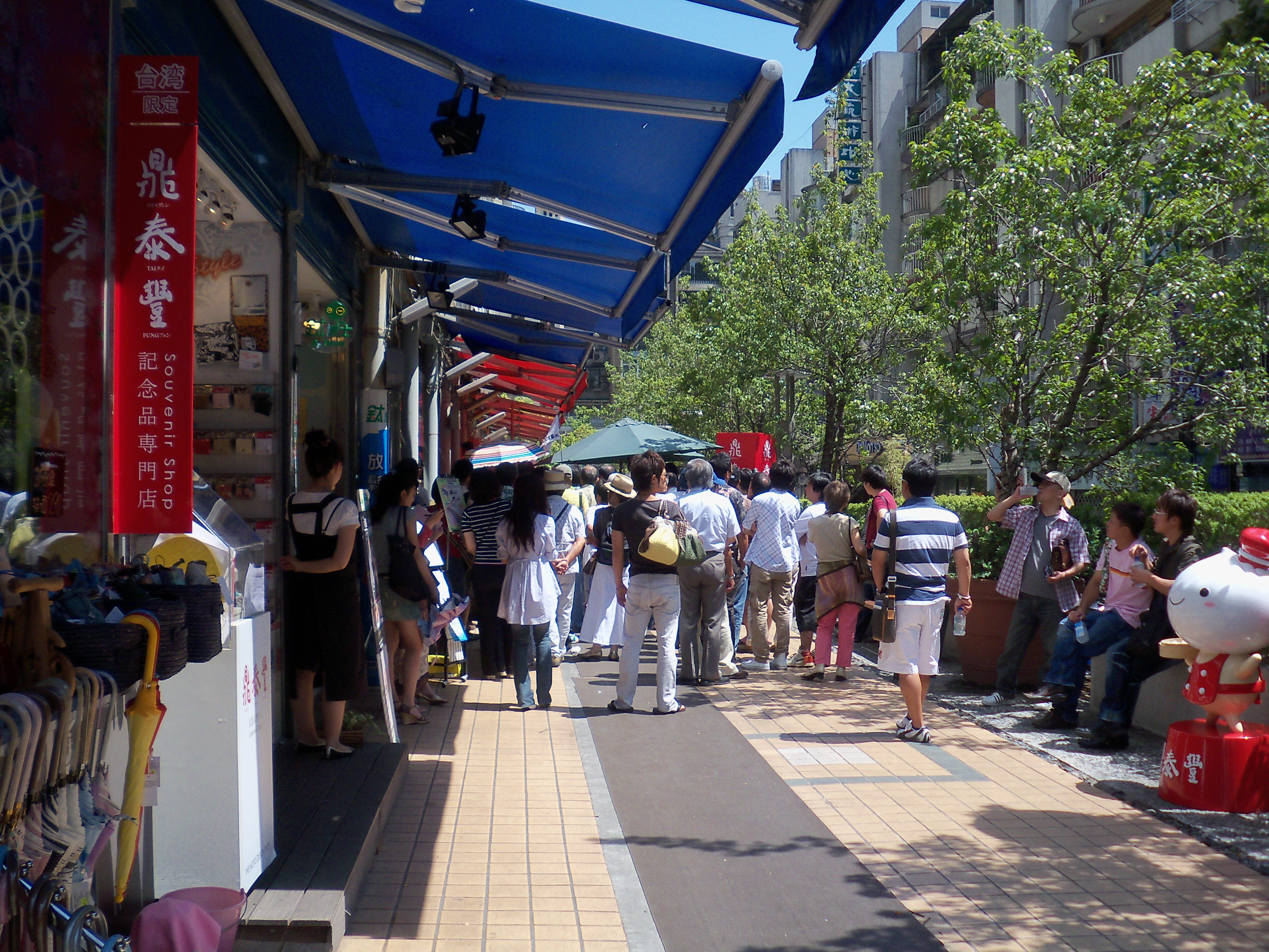 中文（台灣）: 鼎泰豐臺北市忠孝店入口前的紀念品店。